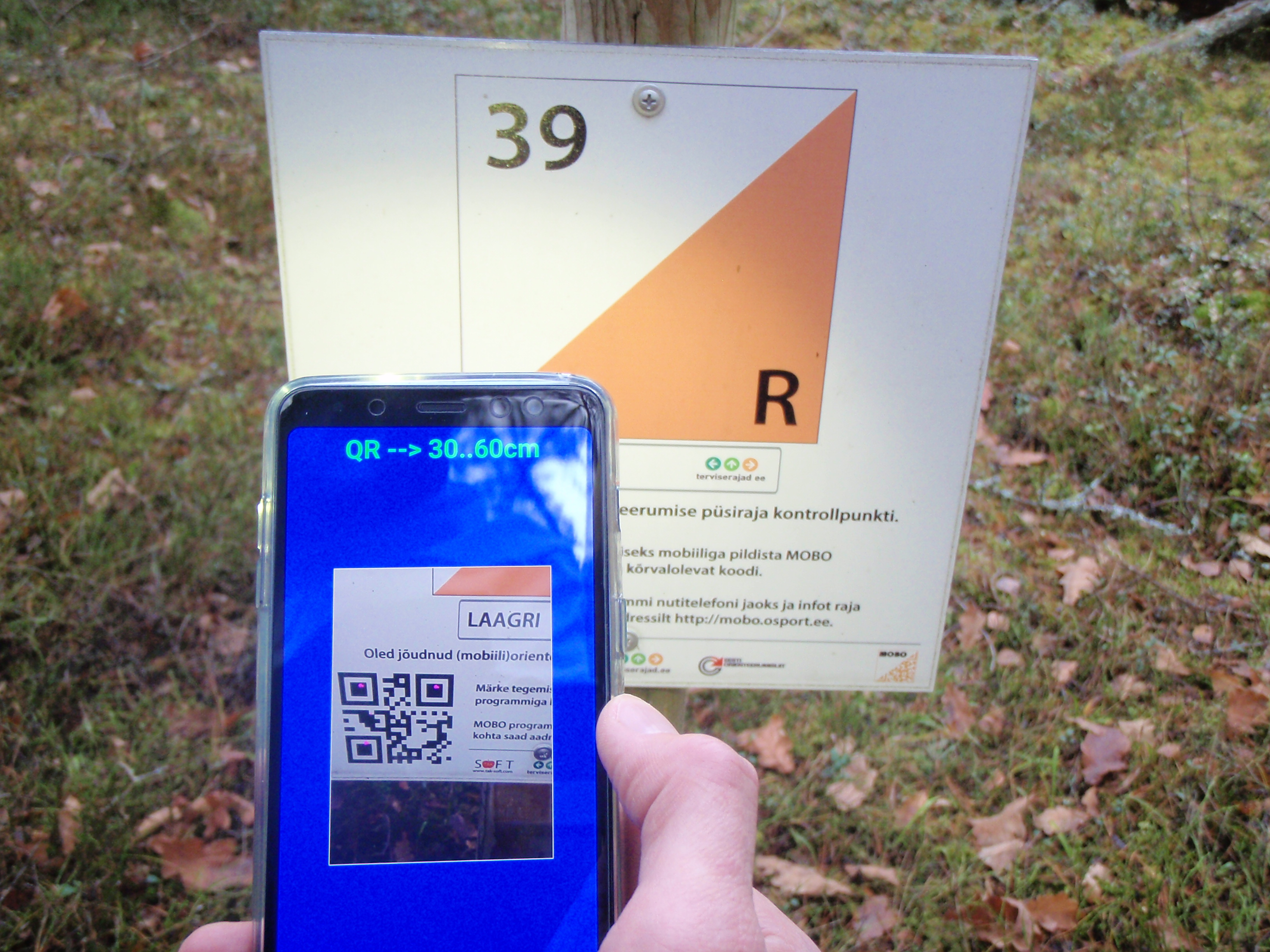 QR-koodi lugemine mobiiliorienteerumise kontrollpunktis